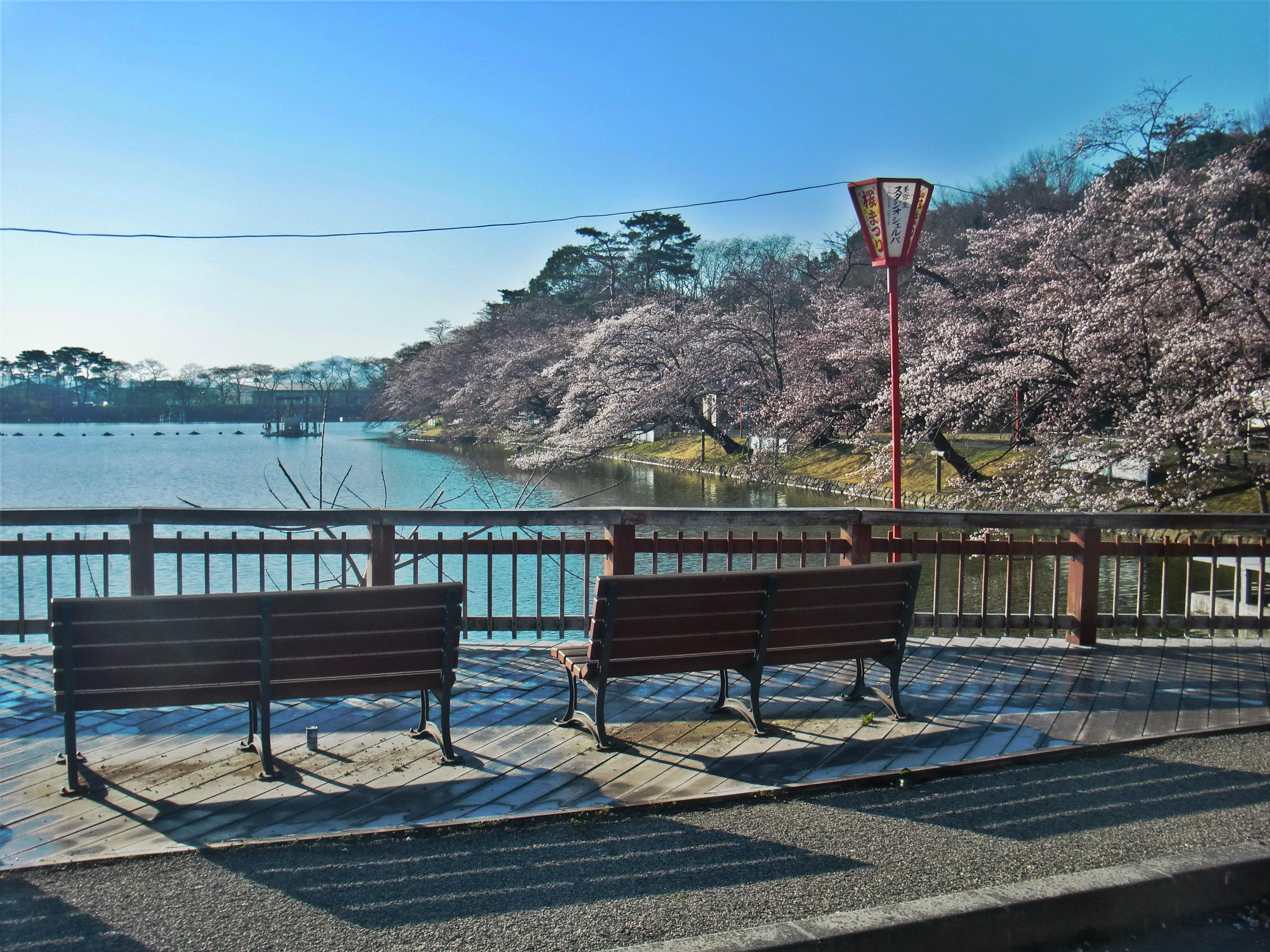 郡山市 五百渕 桜の季節 デッキ付近